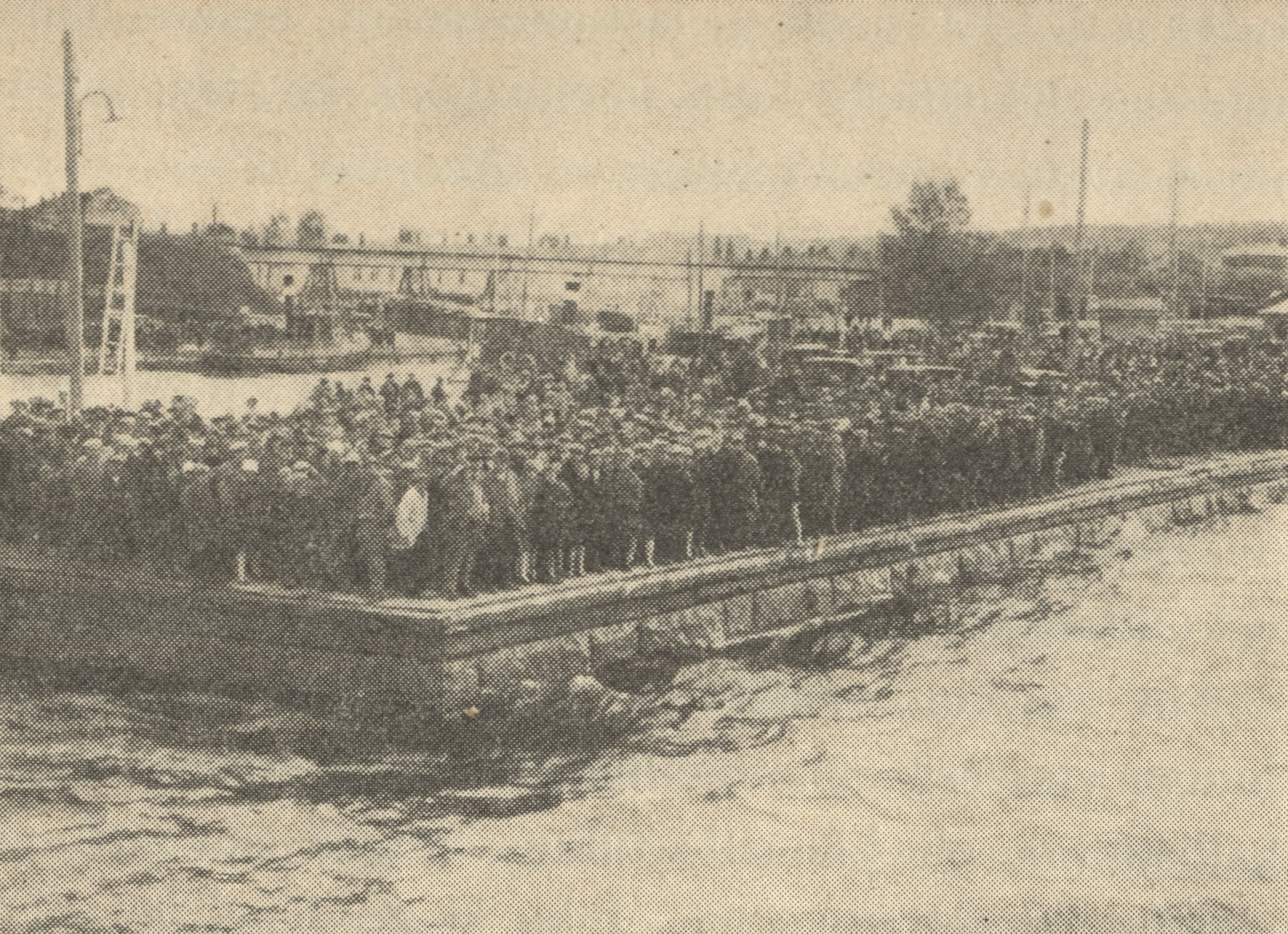 Description